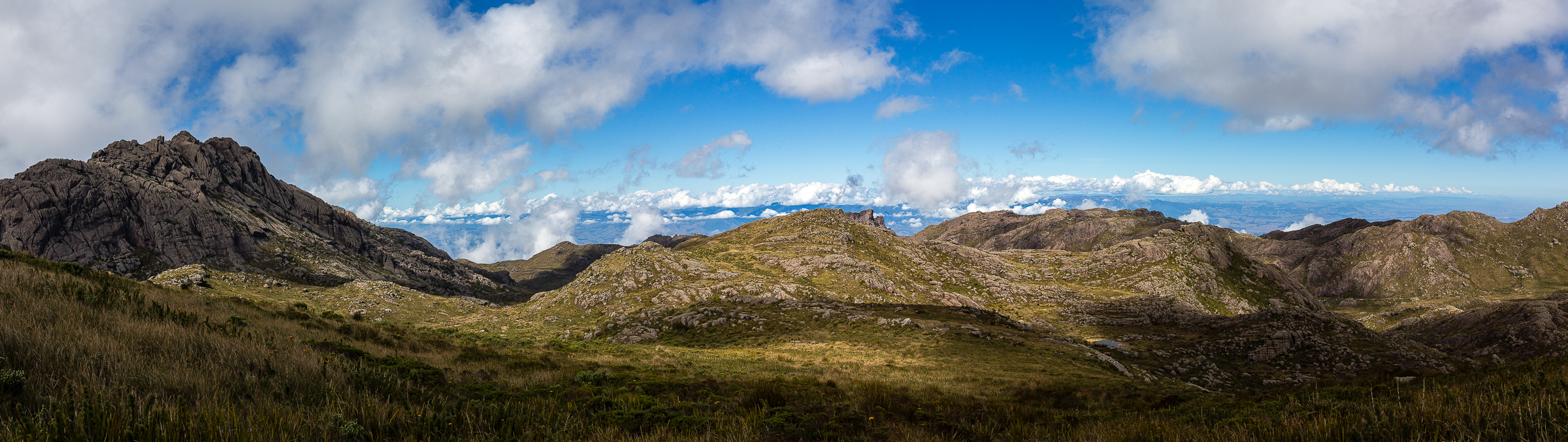 Panoramica feita a partir de 3 fotografias. Parque Nacional do Itatiaia - Brasil.